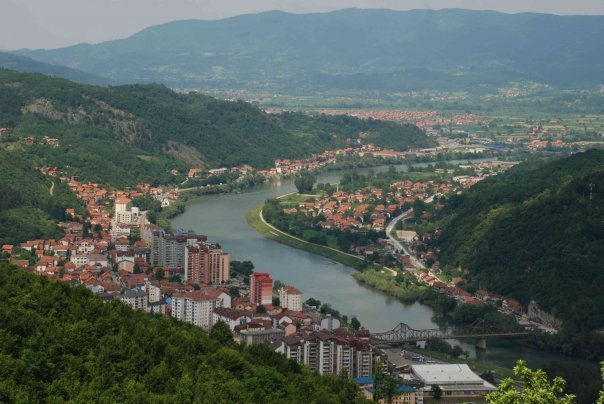 аутор и извор: фотографисано